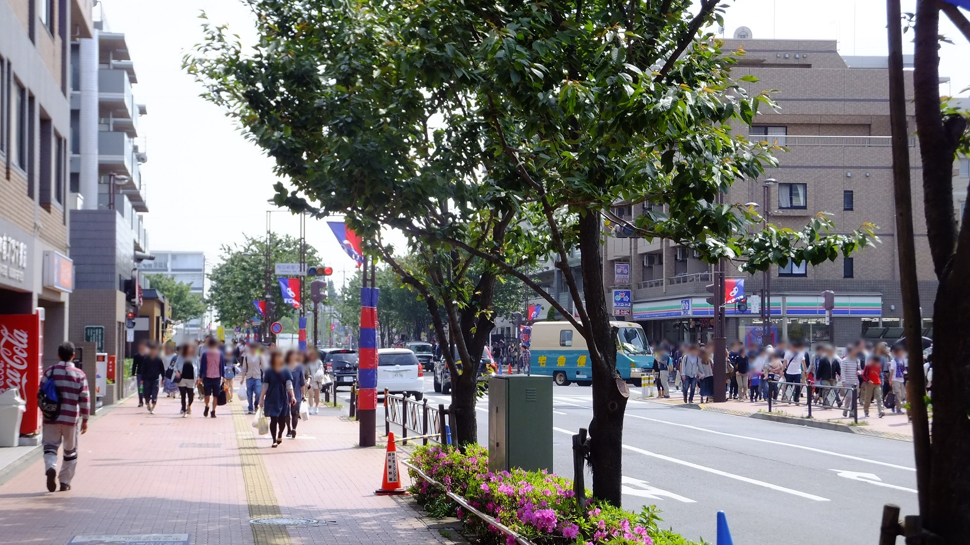 味の素スタジアムに向かうサッカーファンの方々